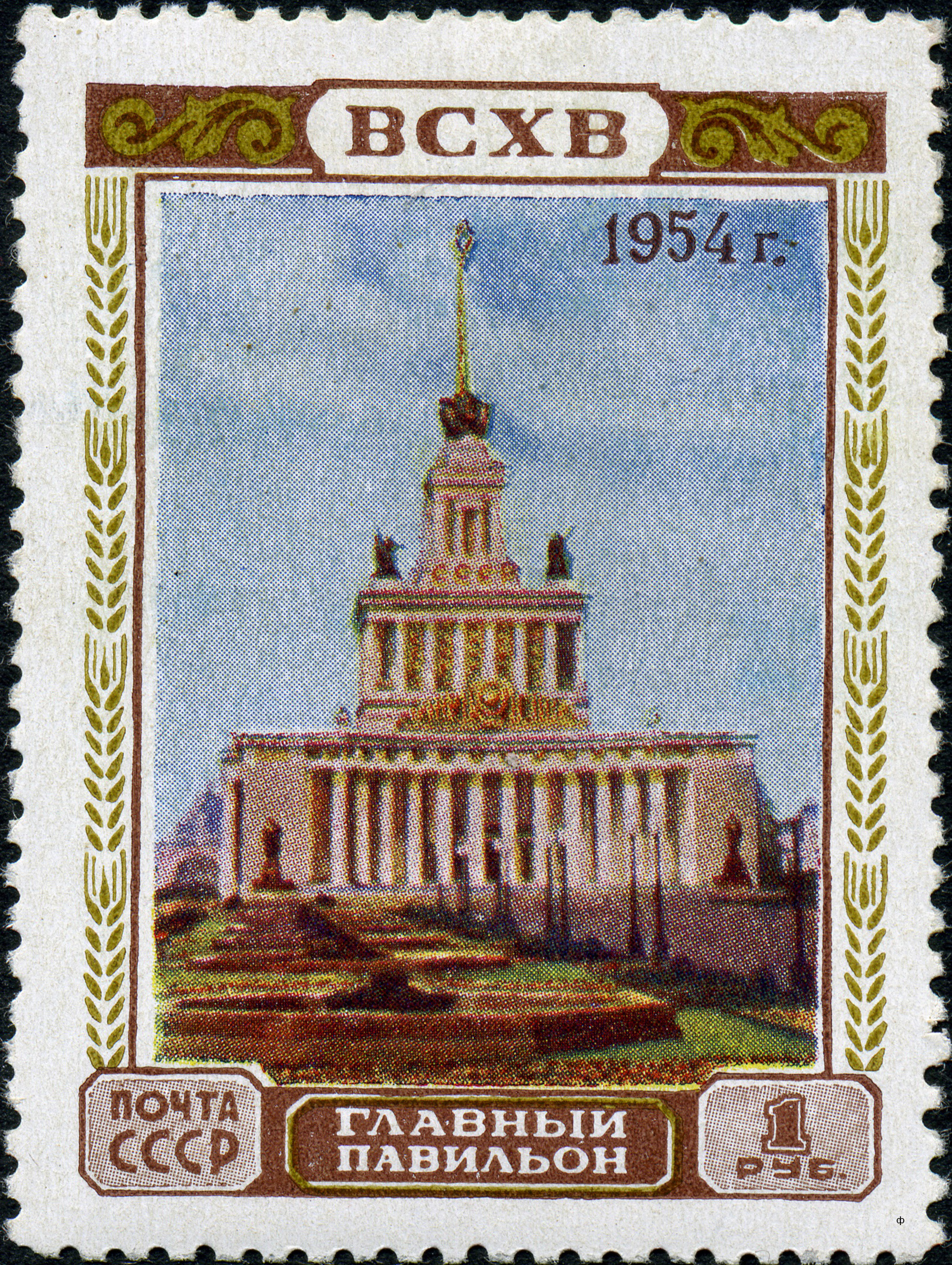 Марка СССР